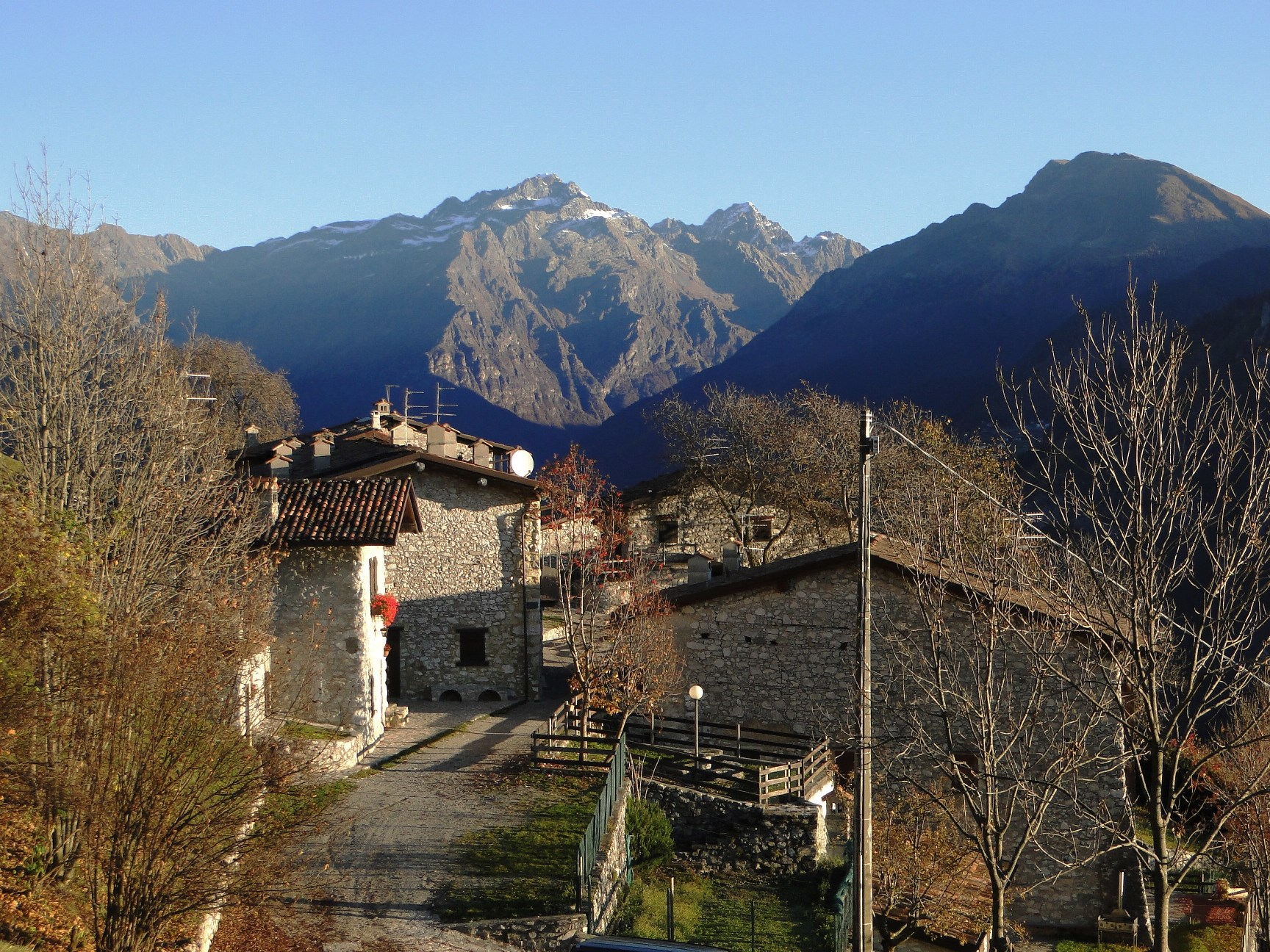 Cacciamali, frazione di Ardesio (BG)